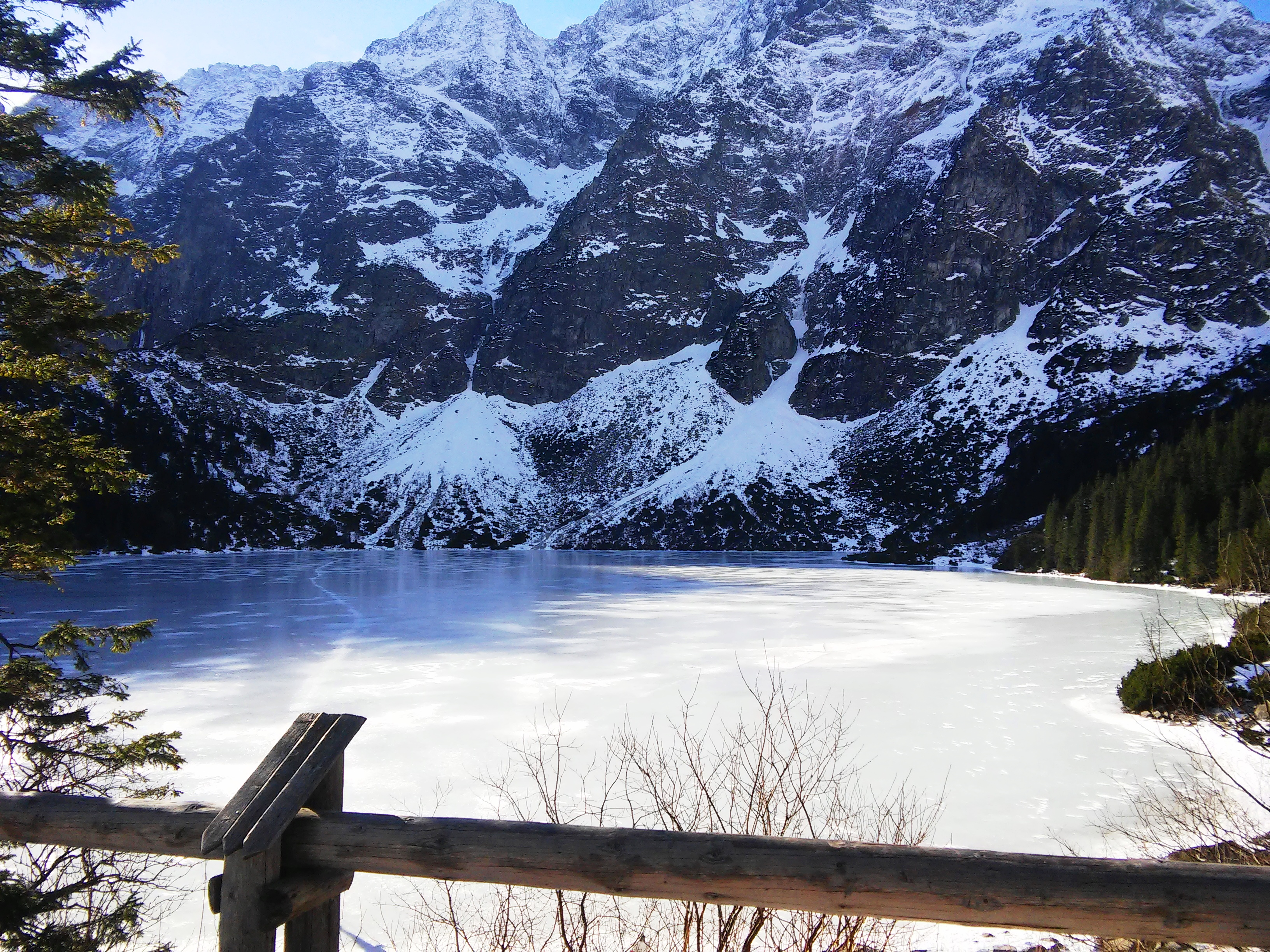 Morskie Oko- widok naTatry